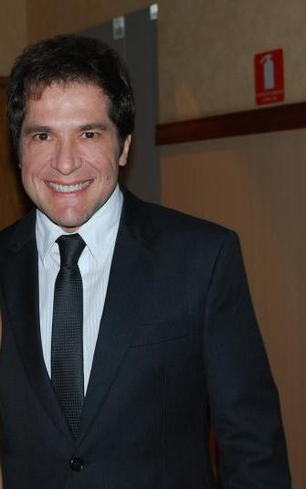 Cantor Daniel no CH & X 40 Anos.